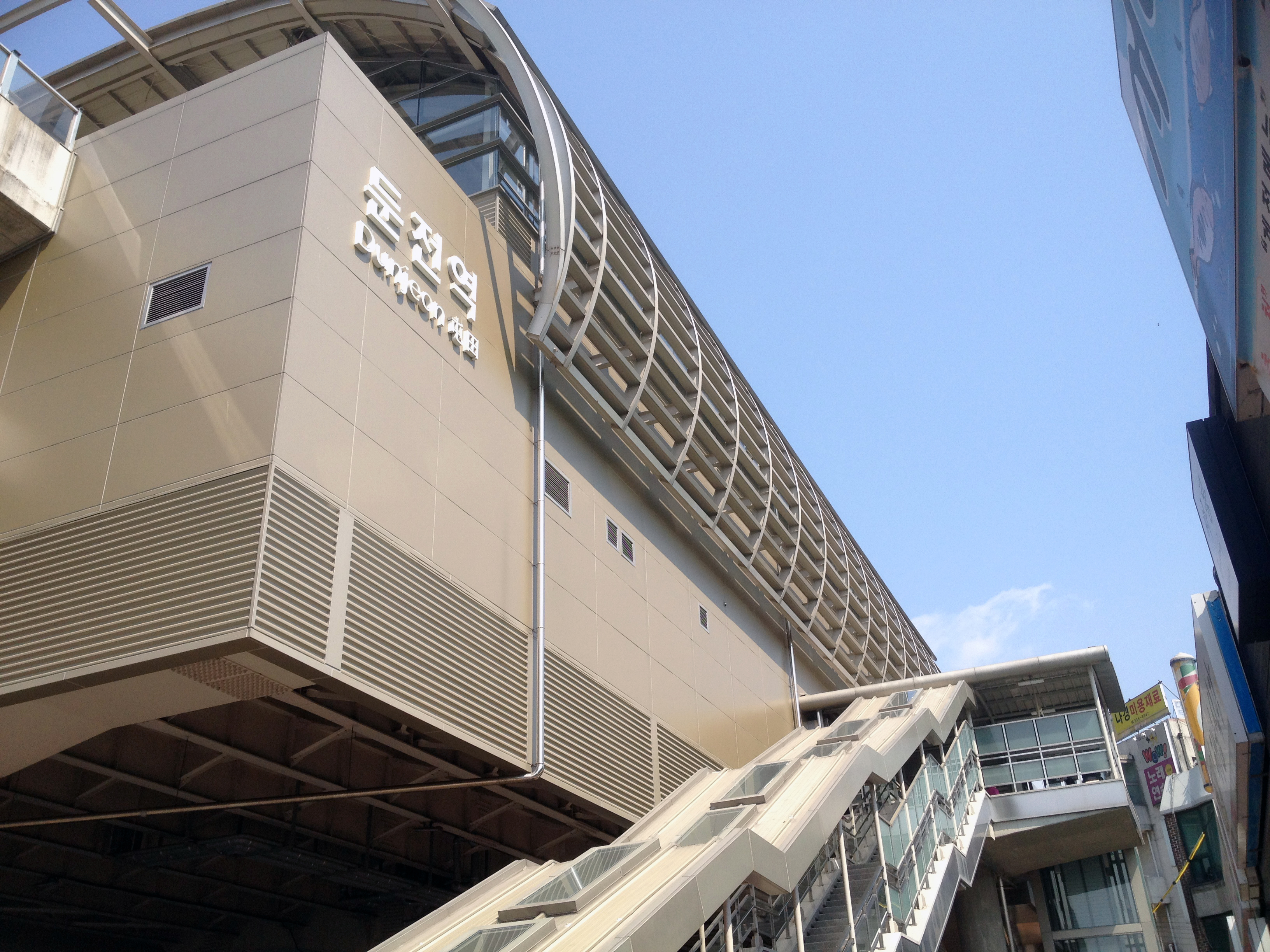 둔전역 역사